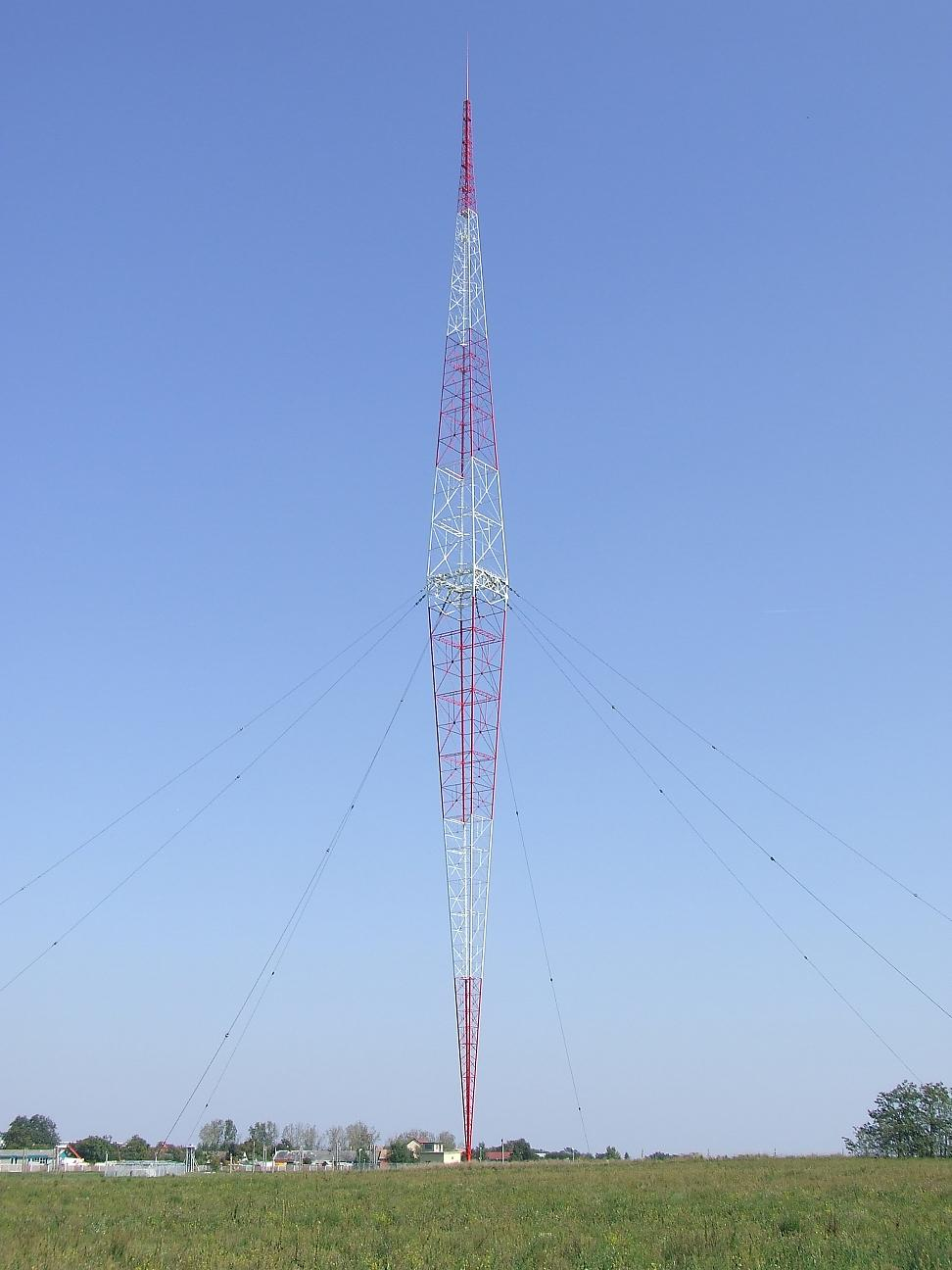 A lakihegyi adótorony 2007. szeptember 22-én.